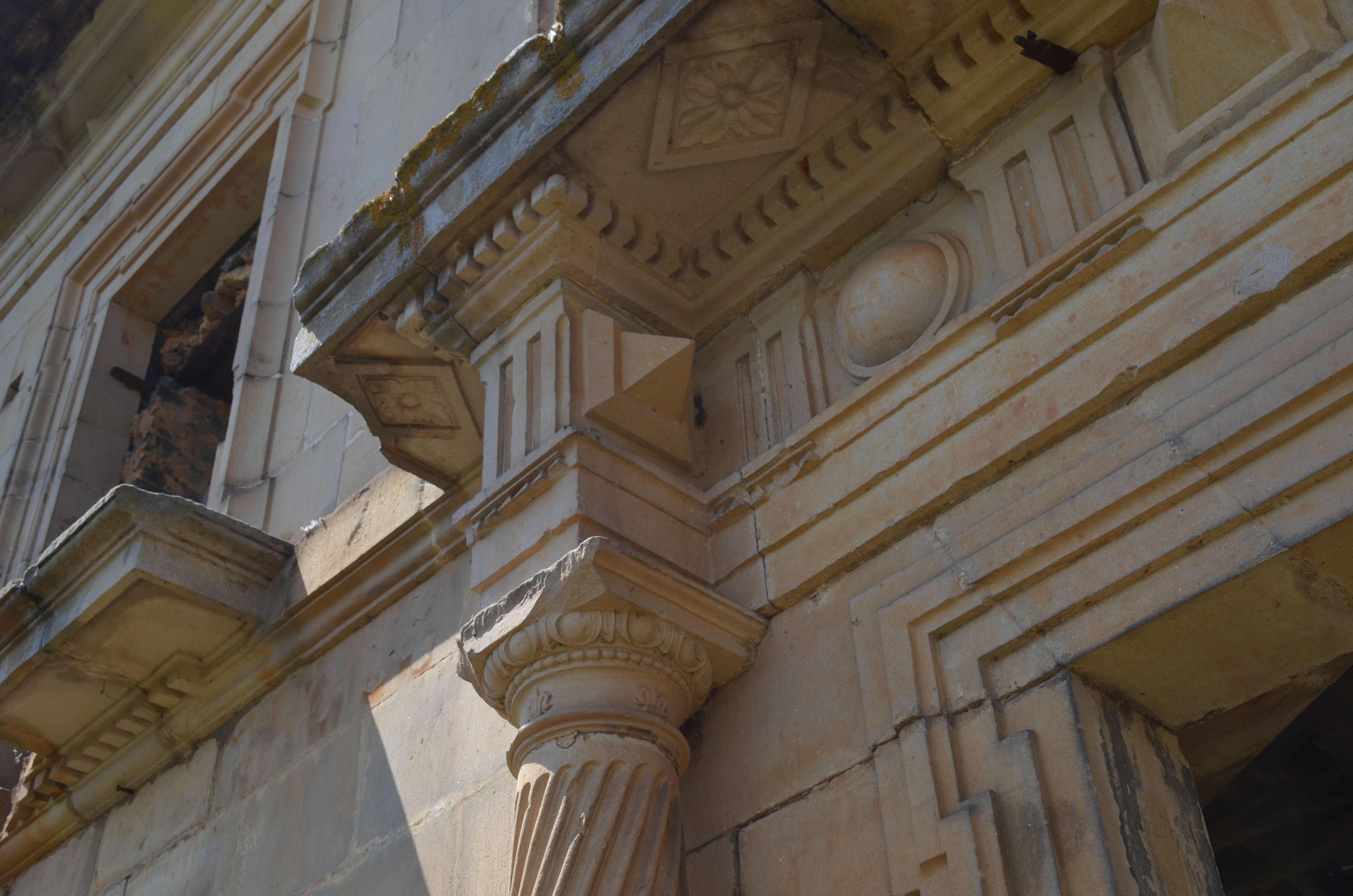 Detalle de la Torre de Celles en Siero, Asturias, España